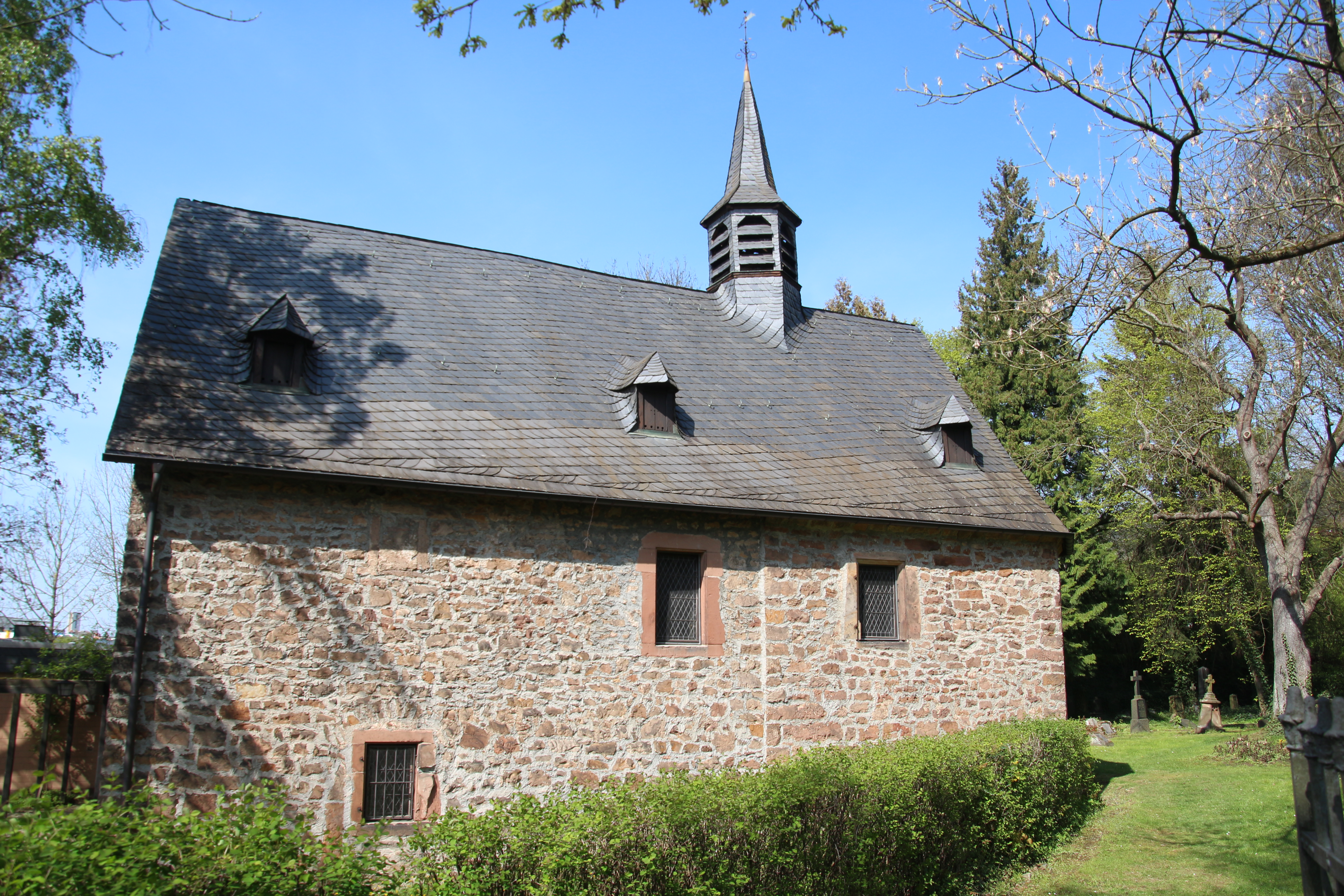 Siehe Bild und Dateiname